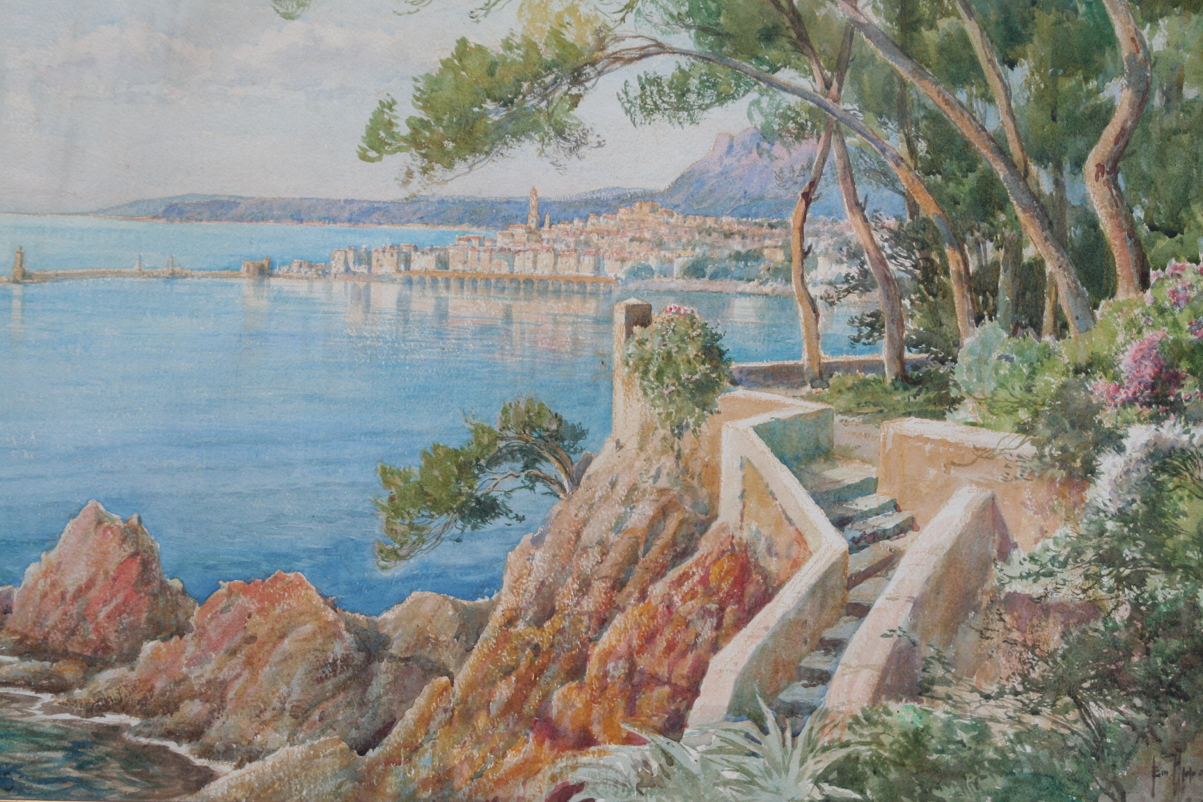 Menton - tableau de Émile Appay (1876-1935)